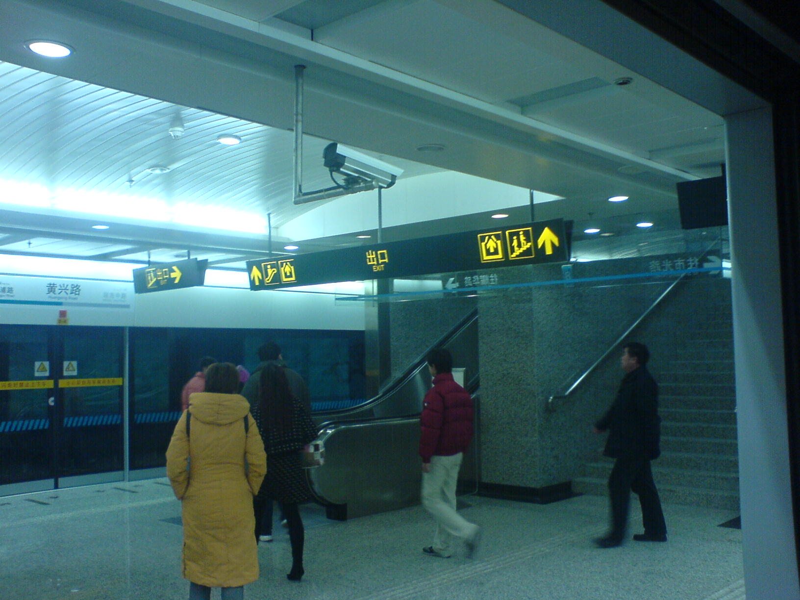 黄兴路站站台